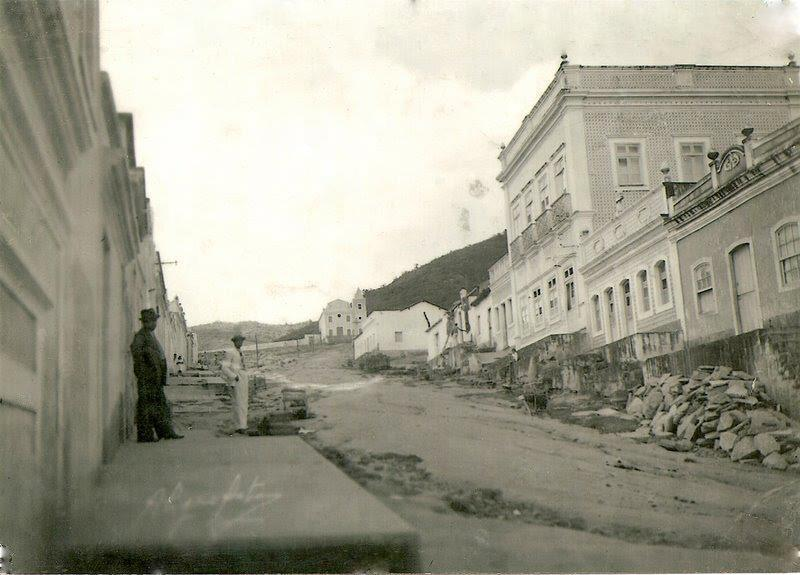 Rua de São José na cidade do Brejo da Madre de Deus na primeira metade do século XX